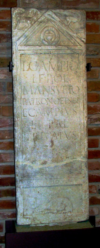 Asti, Museo Sant'Anastasio